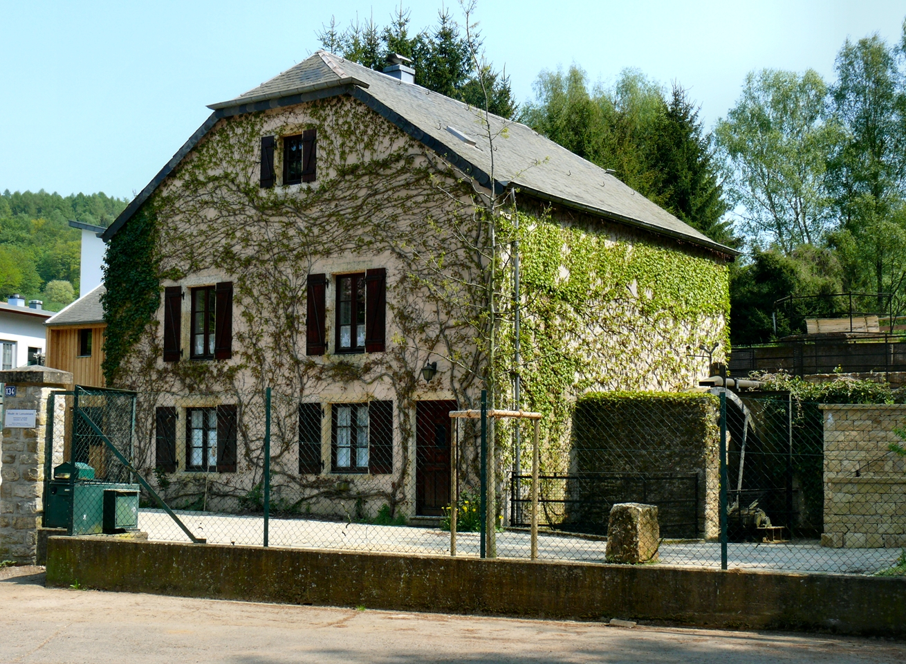 Al Millen zu Rolleng, Gemeng Péiteng; Peiteng Kategorie:Gemeng Péiteng